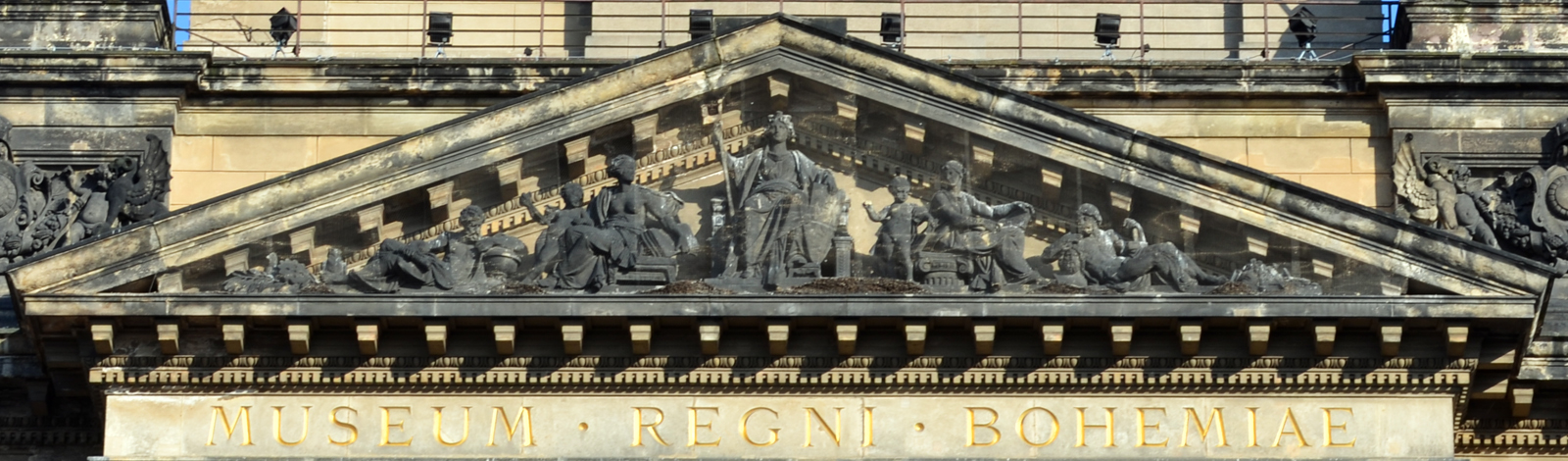 Antonín Pavel Wagner, Čeněk Vosmík, alegorický výjev Čechie chrání vědu a umění, Národní muzeum